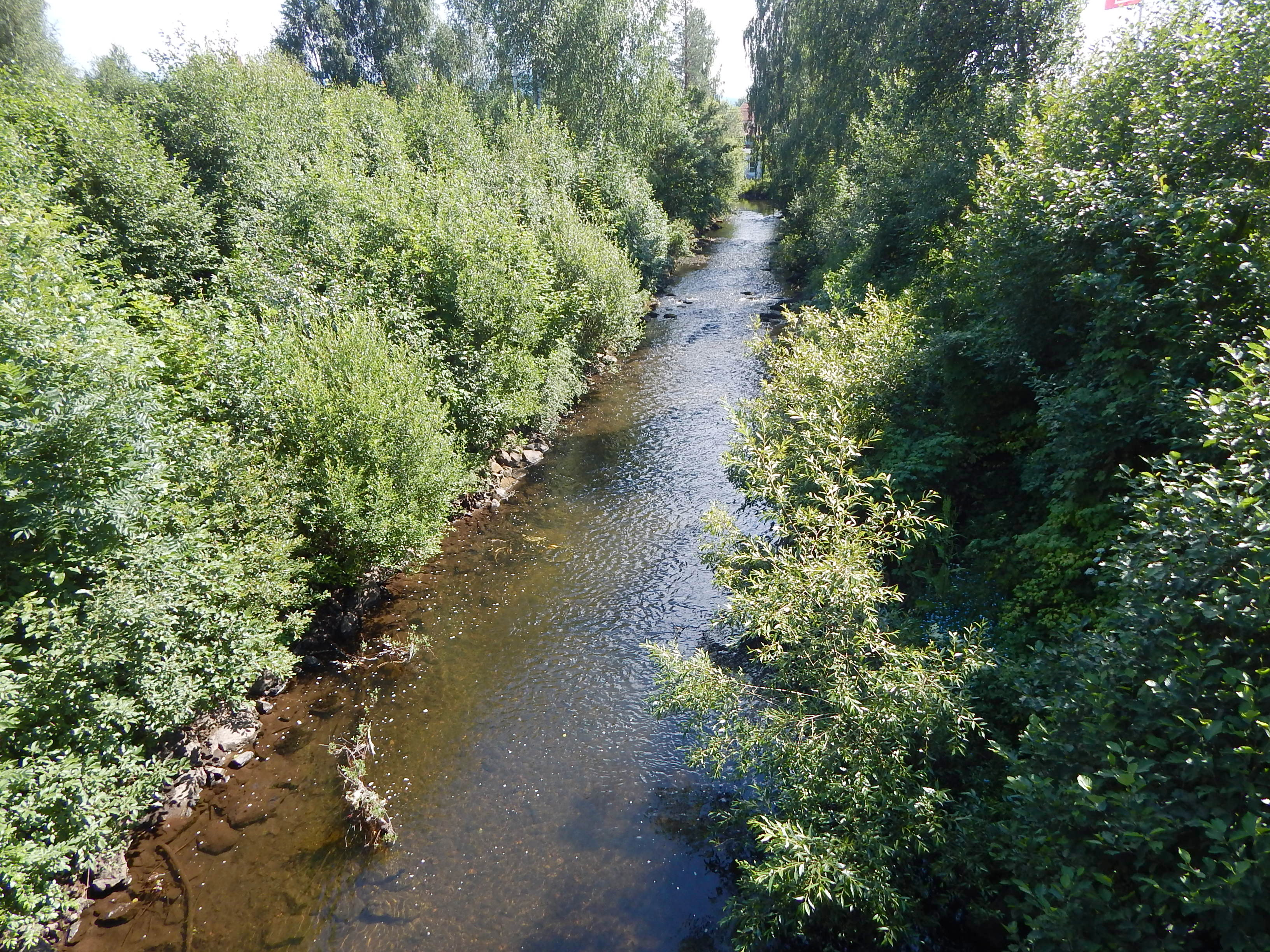 Vigga sørøst for Ringvang bru på Brandbu